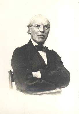 Saksa füüsik ja meteoroloog Ludwig Friedrich Kämtz (1801–1867).